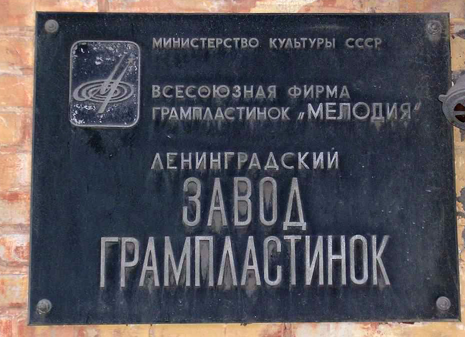 Ленинградский завод грампластинок. Снимок сделан мной. Обработан в программе Gimp. Оригинал у меня.